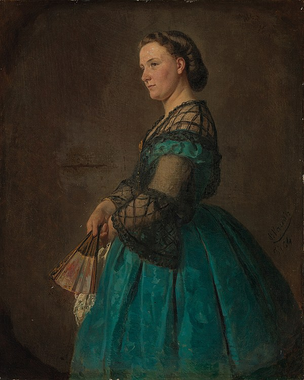 Bildnis der Frau des Künstlers Benjamin Vautier, Öl auf Leinwand, 51 x 41 cm, Standort: Museum Oskar Reinhart, Winterthur, SIK-ISEA Inventarnummer 27693